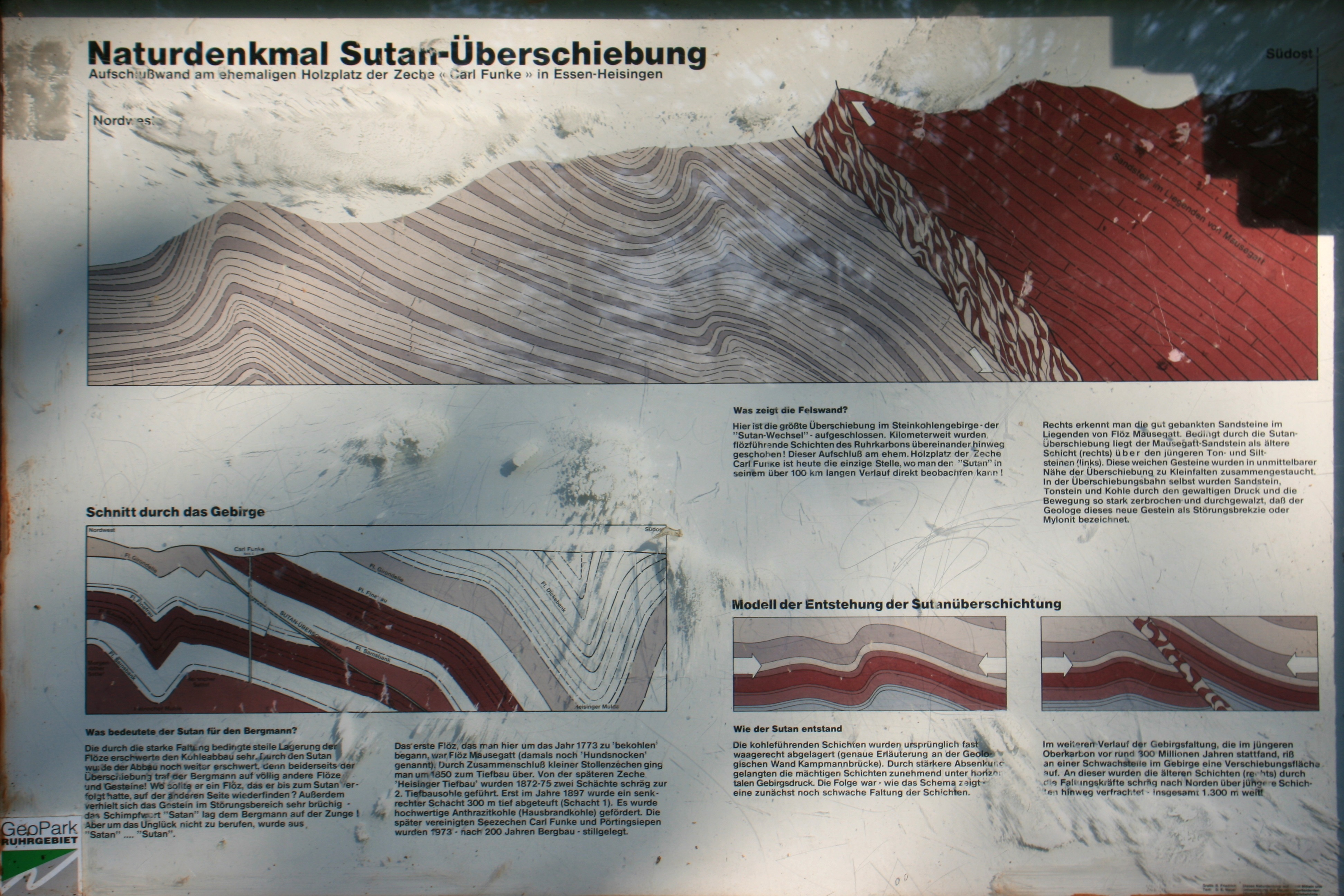 Sutan-Überschiebung auf dem Gelände der ehemaligen Zeche Carl Funke, Lanfermannfähre am Baldeneysee in Essen-Heisingen